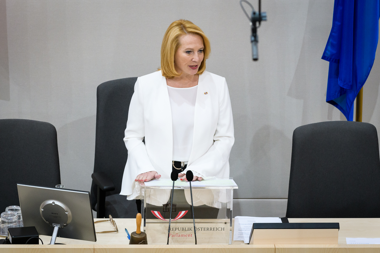 DXX_6802